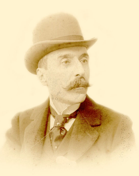 O escritor Eça de Queirós durante a época que foi cônsul em Paris, 1893 (circa).